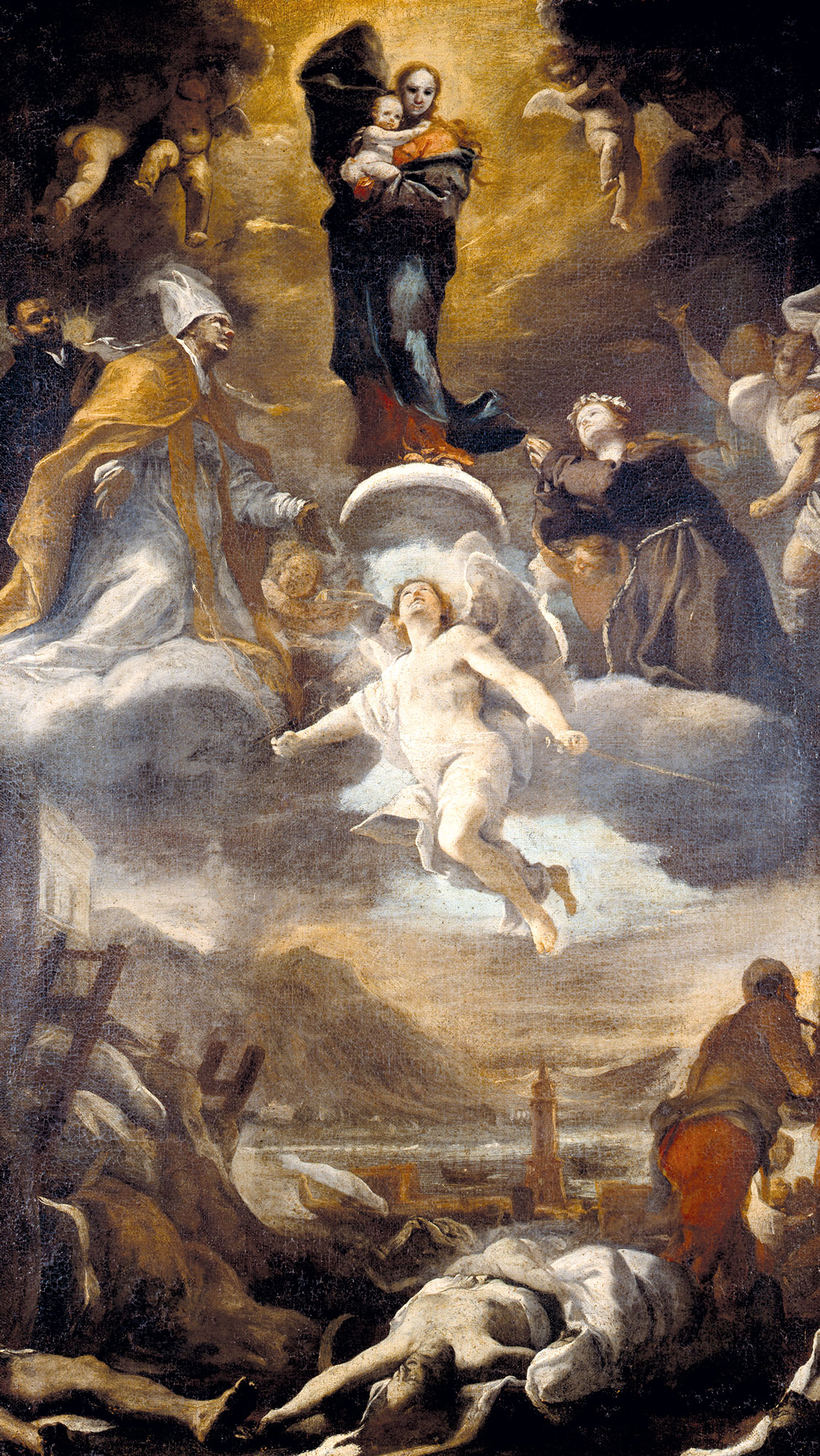 Bozzetto di uno degli affreschi votivi per la fine della peste del 1656 realizzati sulle porte cittadine di Napoli